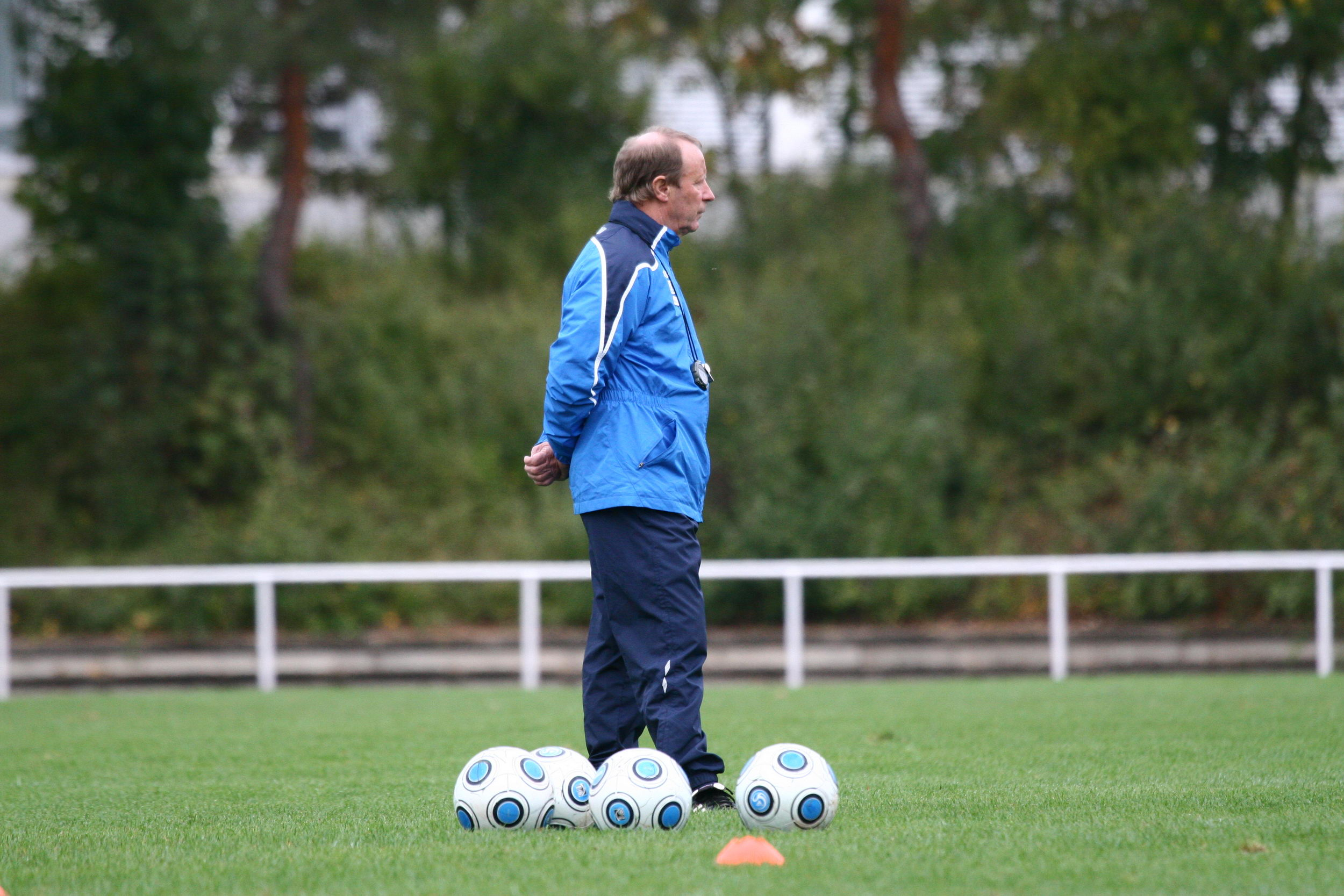 Berti Foqts